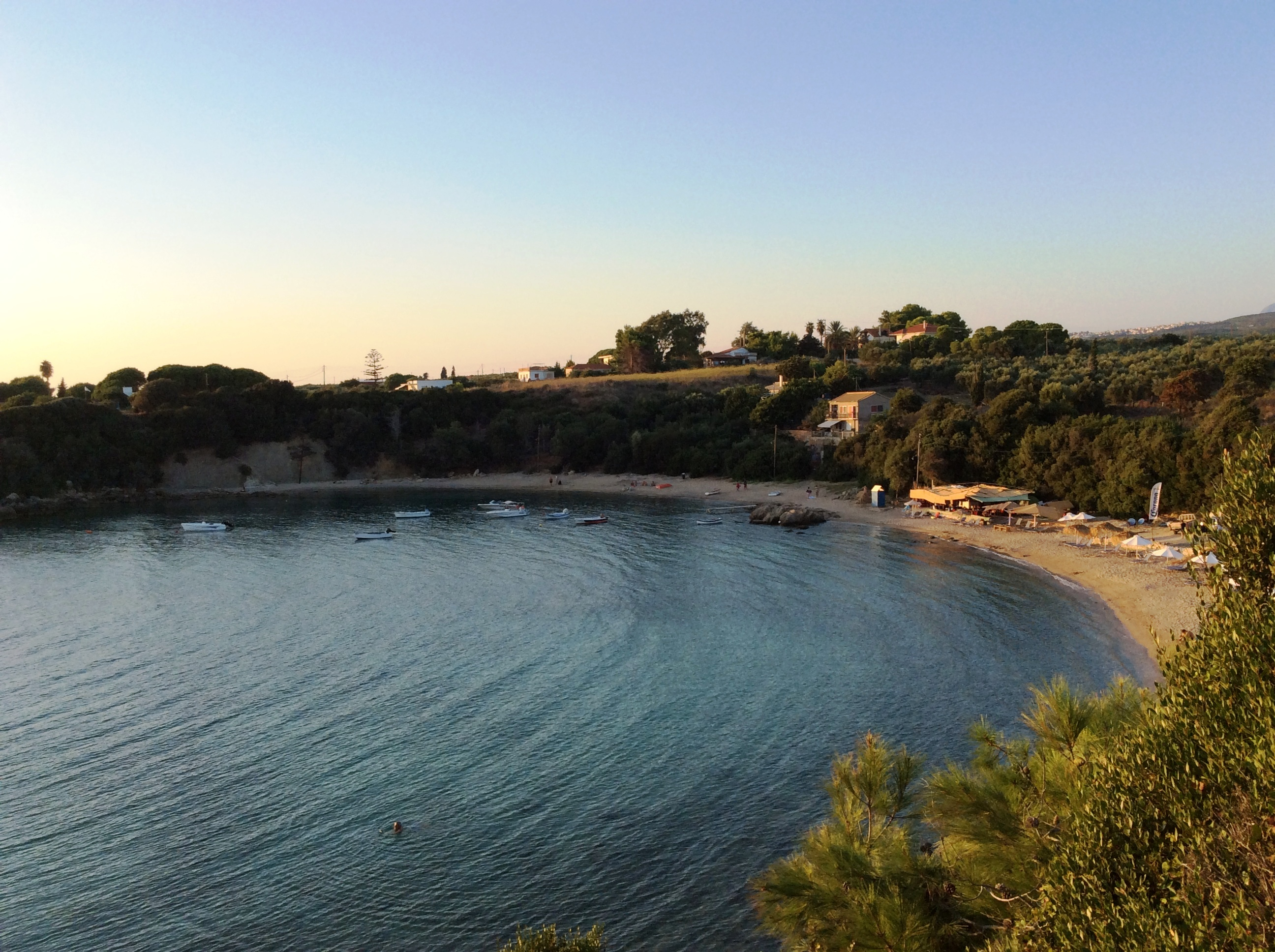 Βρομονέρι Μεσσηνίας. Άποψη της νοτιοδυτικής παραλίας του Βρομονερίου.